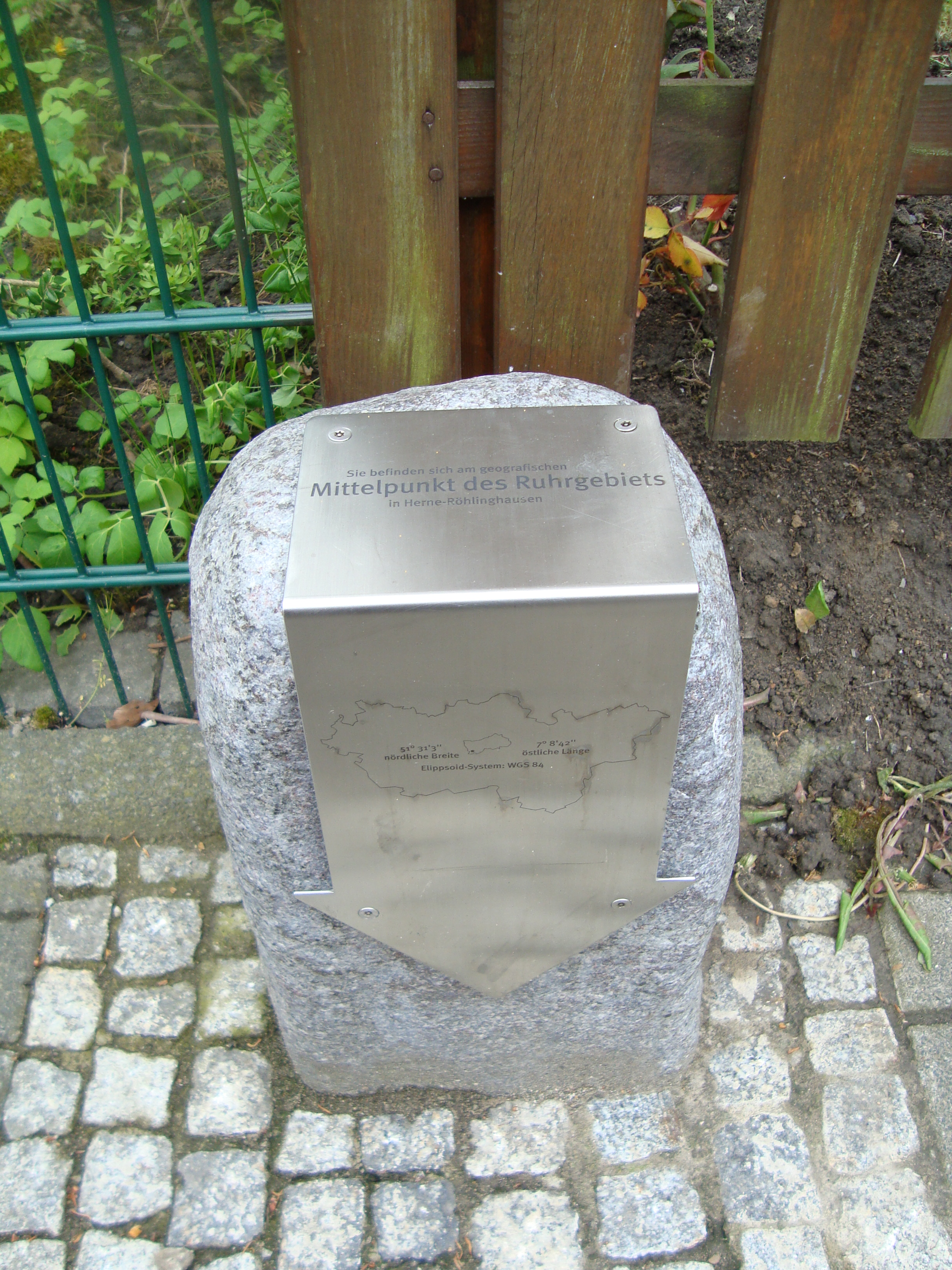 Mittelpunkt der Metropole Ruhr an derRolandstraße49 in Herne